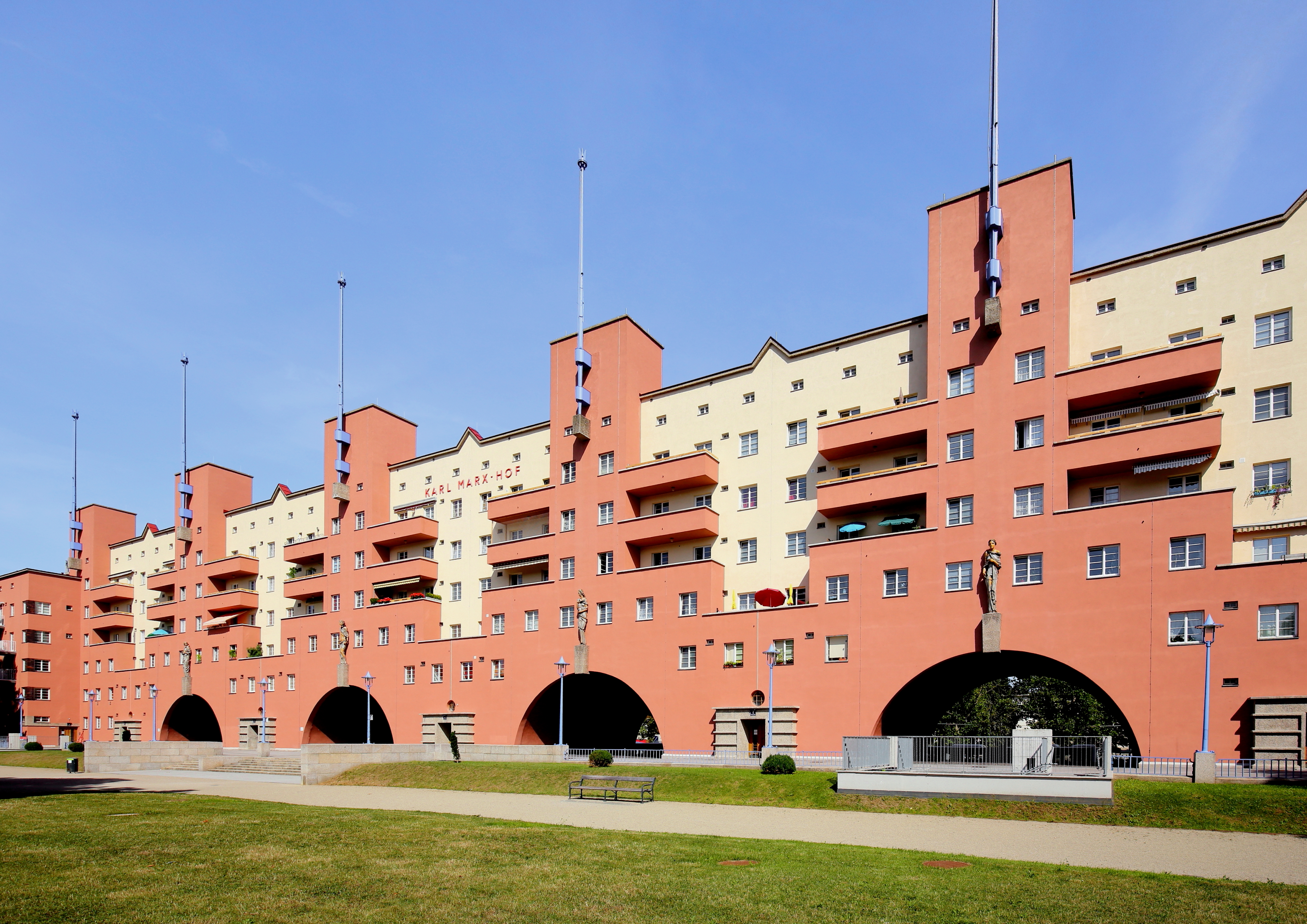 Der stark zurückversetzte Mitteltrakt mit seinen sechs monumentalen Türmen der denkmalgeschützten Wohnhausanlage Karl-Marx-Hof der Gemeinde Wien im 19. Wiener Gemeindebezirk Döbling.Der Bau mit 1382 (aktuell rd. 1270) Wohneinheiten wurde von 1927 bis 1933 nach Plänen des Architekten Karl Ehn errichtet (die offizielle Eröffnung der Anlage fand am 12. Oktober 1930 statt). Er ist wohl der repräsentativste, sicherlich aber der bekannteste kommunale Wohnbau der Stadt Wien als Musterbeispiel eines monumentalen Superblocks. Er erstreckt sich über 1.100 Meter entlang der Heiligenstädter Straße und ist damit der längste zusammenhängende Wohnbau der Welt.Die vier Figuren über den Rundbögen sind Werke des Bildhauers Josef Franz Riedl (1884–1965) und symbolisieren die „Freiheit“, die „Fürsorge“, die „Aufklärung“ und die „Körperkultur“.